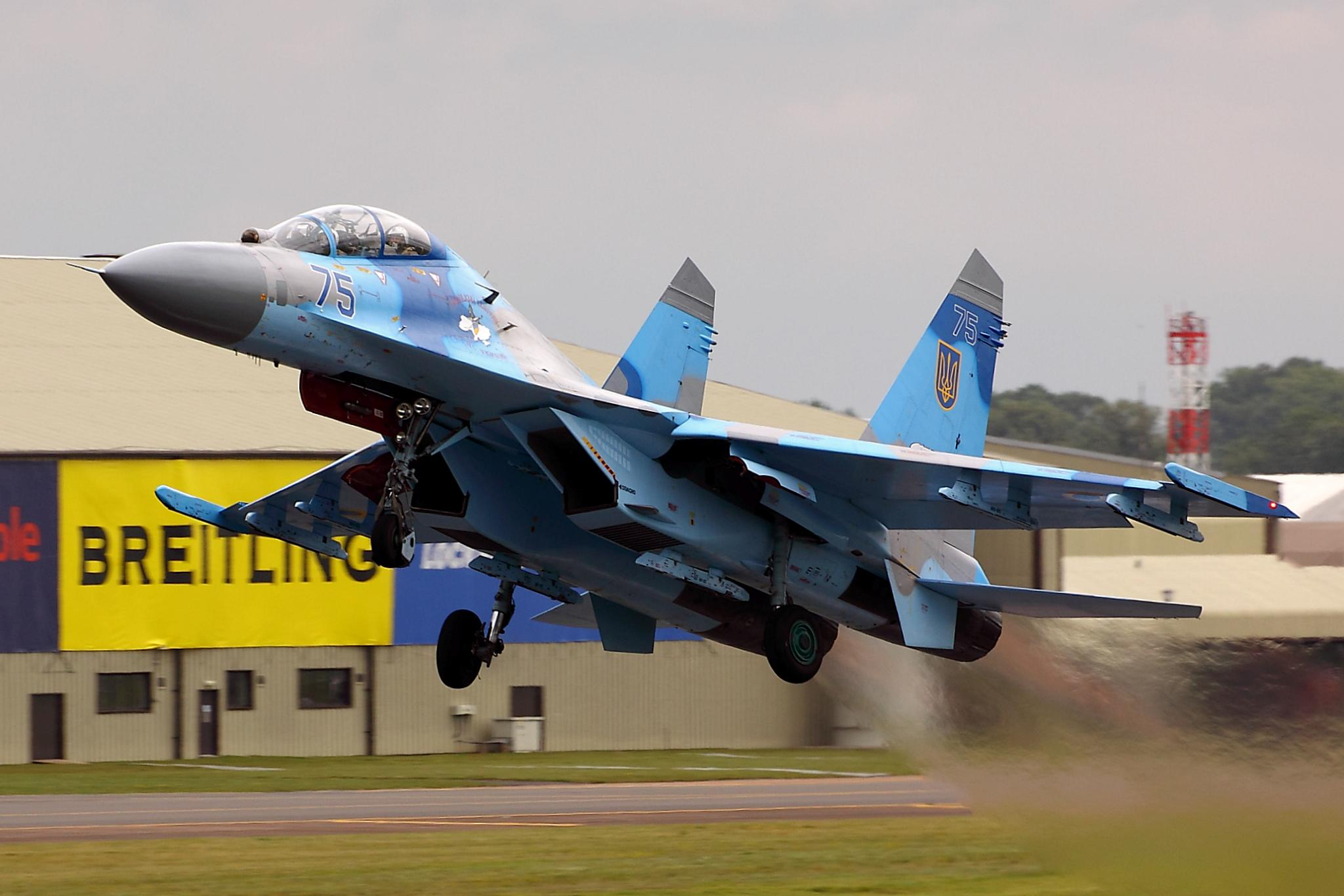 SU27 - RIAT 2011